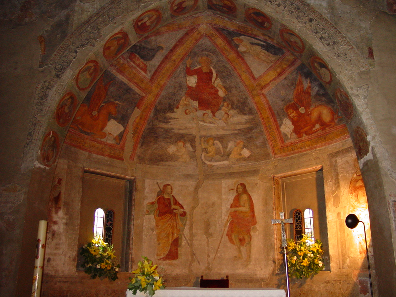 Chiesa di San Cristoforo - Milano - Italy - Affresco absidale